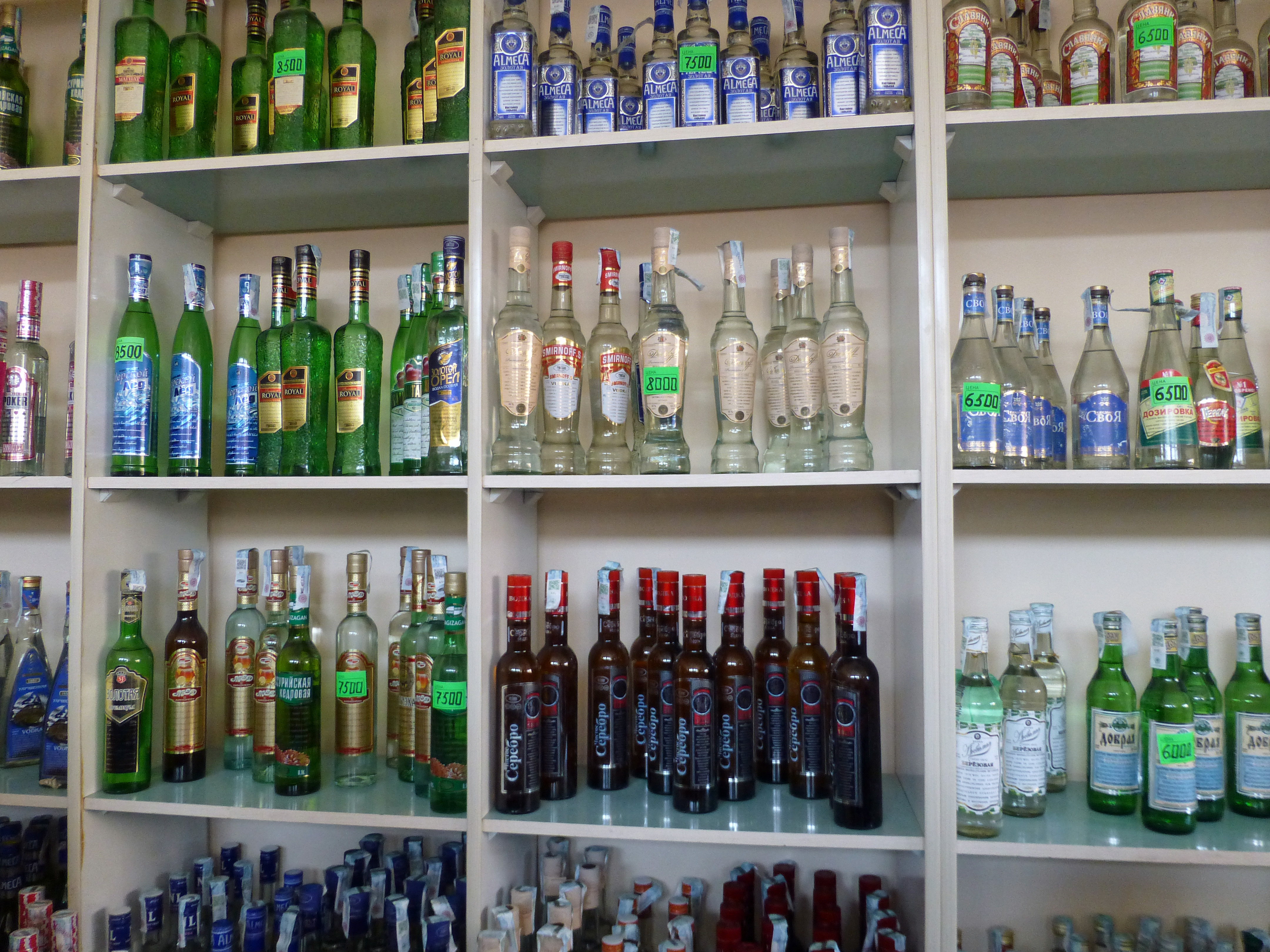 Vente de vodka au Siyob Bazaar, le grand marché de Samarcande (Ouzbékistan)